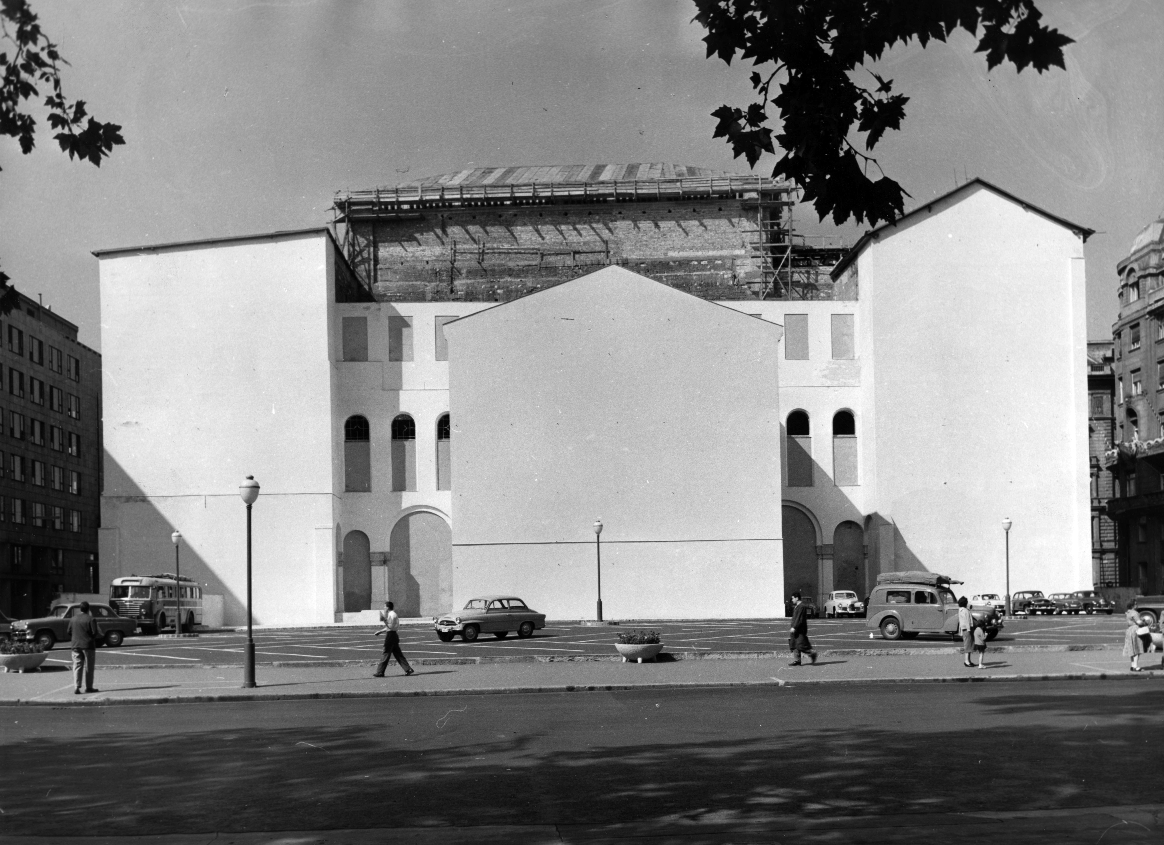 Vörösmarty tér, parkoló a Vigadó hátoldalánál. A kép forrását kérjük így adja meg: Fortepan / Budapest Főváros Levéltára. Levéltári jelzet: HU_BFL_XV_19_c_11 Location: Hungary, Budapest V. Tags: Budapest Title: Vörösmarty tér, parkoló a Vigadó hátoldalánál. A kép forrását kérjük így adja meg: Fortepan / Budapest Főváros Levéltára. Levéltári jelzet: HU_BFL_XV_19_c_11